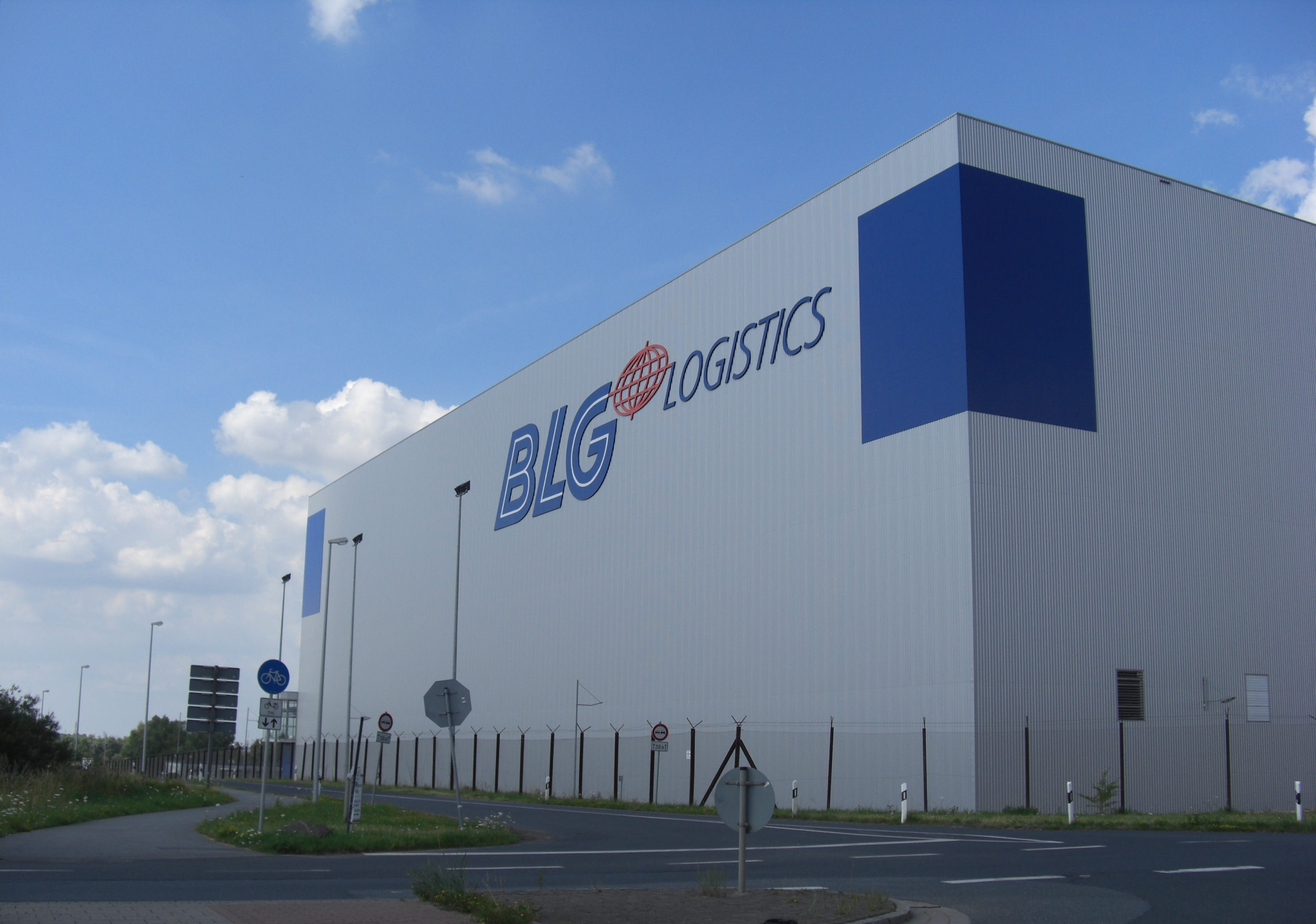 Hochregallager der BLG-Logistics im GVZ Bremen